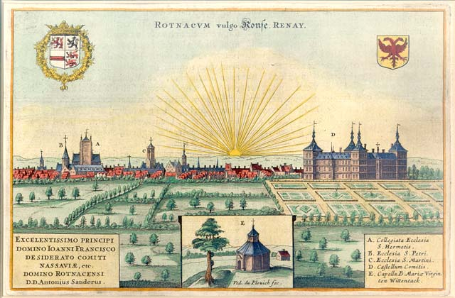 Flandria illustrata", Ronse rond 1641-1644